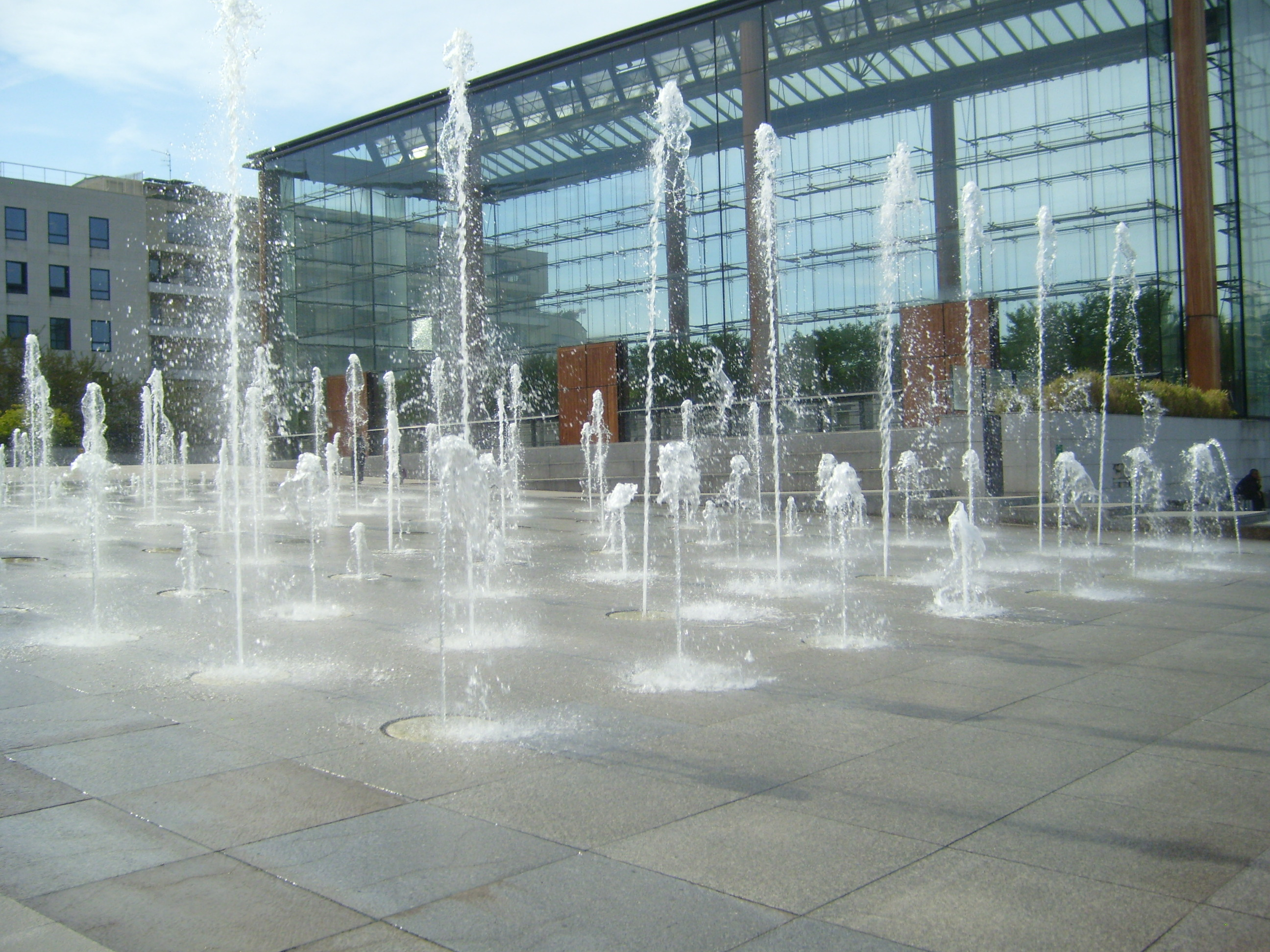 Colonnes d'eau Parc Andre Citroen (1992)